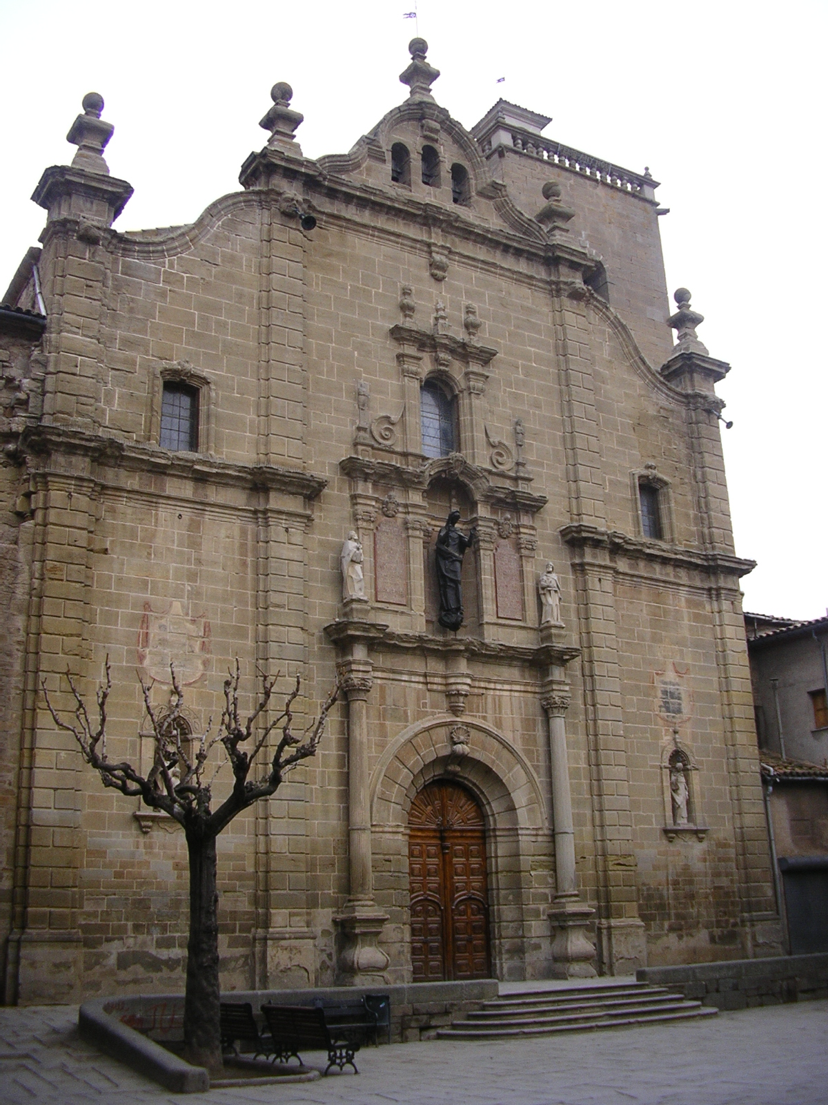 Guissona, iglesia de Santa Maria